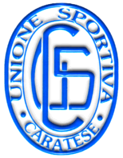 Logo US Caratese Calcio in uso fino al 2011